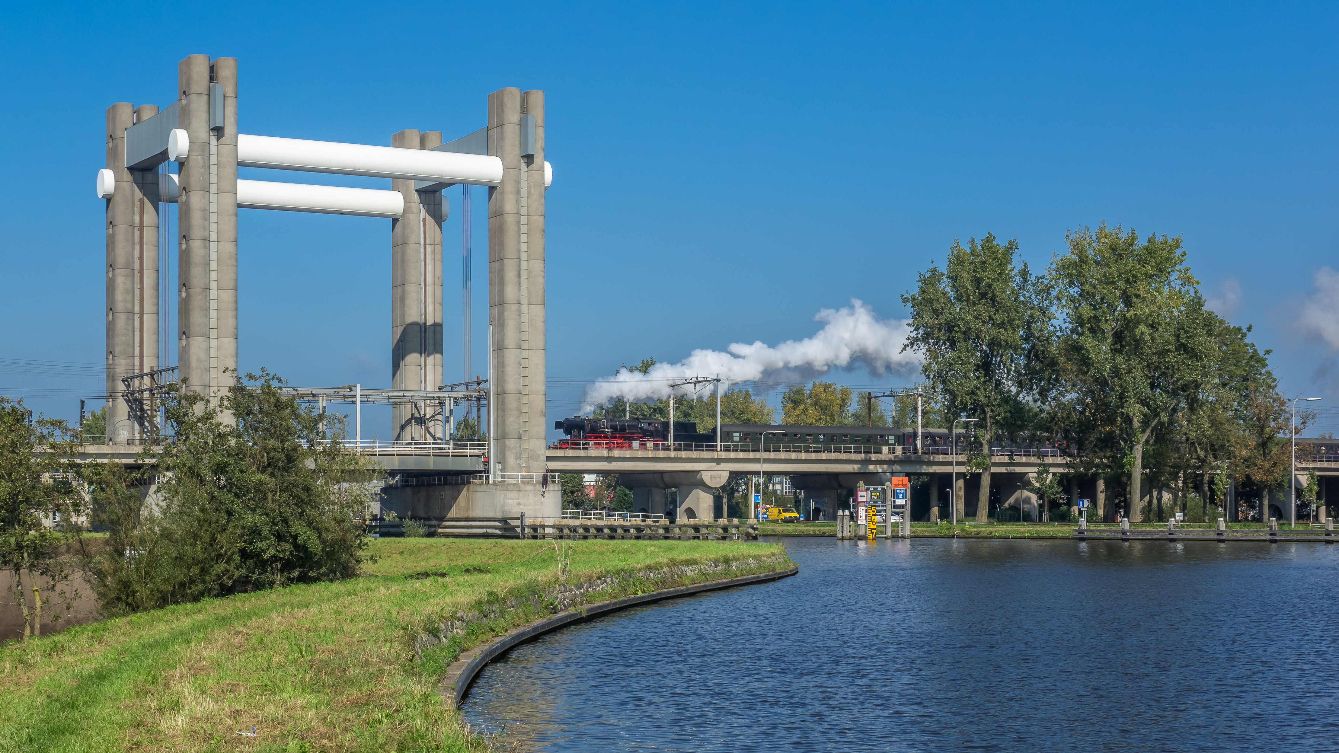 Op 10 en 11 oktober 2015 werden de jaarlijkse stoomtreindagen weer gehouden met pendelstoomtreinritten van Rotterdam naar Gouda en omgekeerd. De diensten werden onder meer uitgevoerd met de stoomlocomotieven BR 011 075-9 van de Stoom Stichting Nederland (SSN) de BR 65 018 eveneens van de SSN en de BR 023-071 van de Veluwsche Stoomtrein Maatschappij.